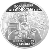 Характеристики монеты Номинал: 10 гривен Тираж: 3000 шт. Материал: серебро 925 Качество: пруф Диаметр: 38,61 мм. Вес: 31,10 гр. Гурт: рифленый